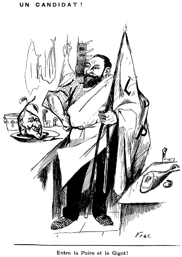 "Un candidat ! Entre la poire et le gigot !"